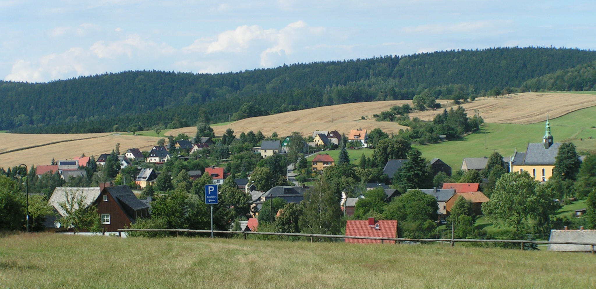 Hinterhermsdorf - Gesamtansicht